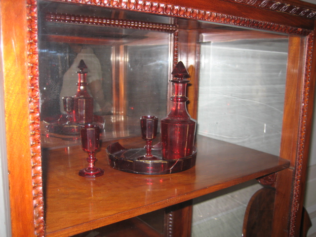 Подлинный прибор Пушкина в музее Пушкина на Мойке, 12, Санкт-Петербурге